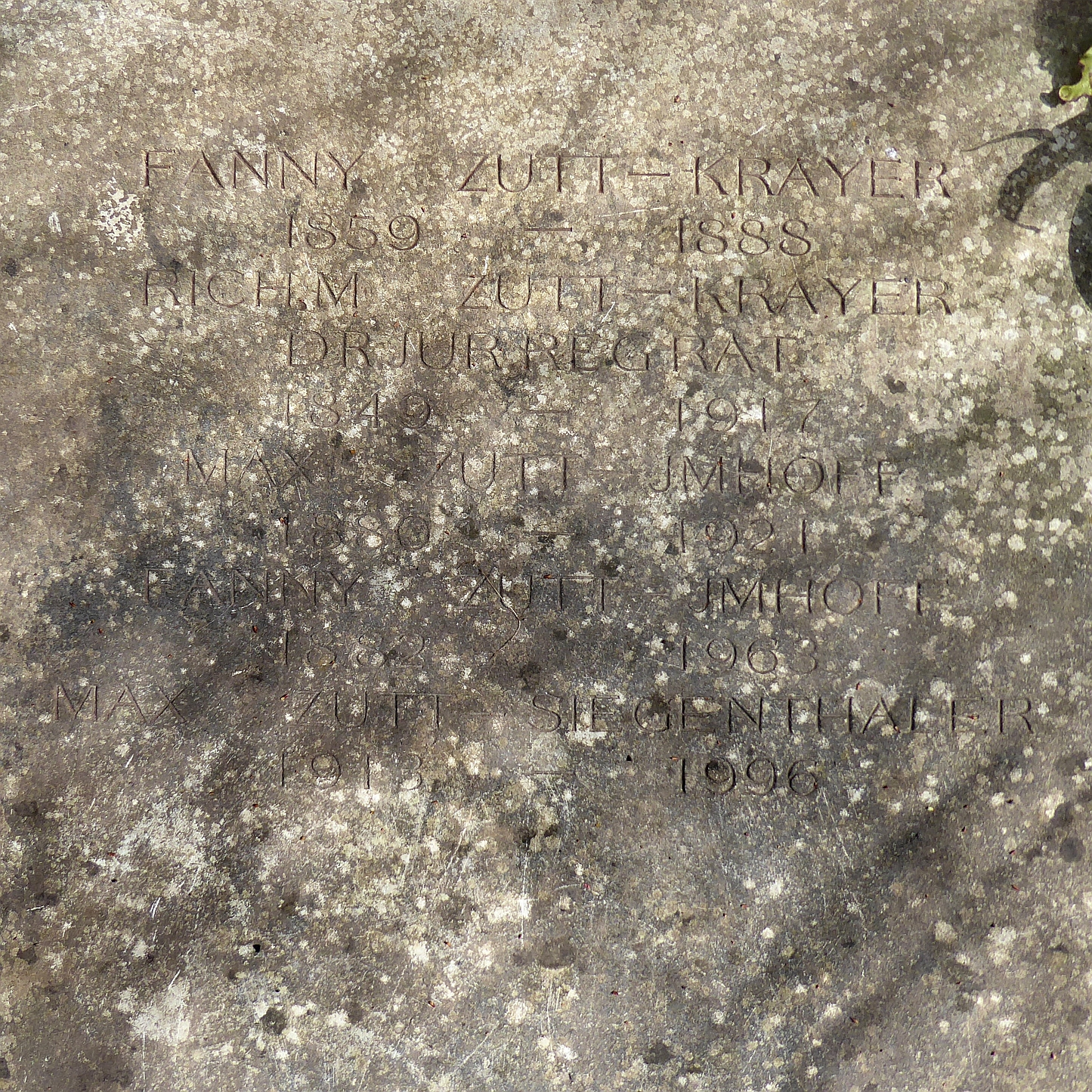 Richard Zutt-Krayer (1849–1917) Dr.jur., Staatsanwalt, Regierungsrat, Familiengrab auf dem Friedhof Hörnli, Riehen, Basel-Stadt.